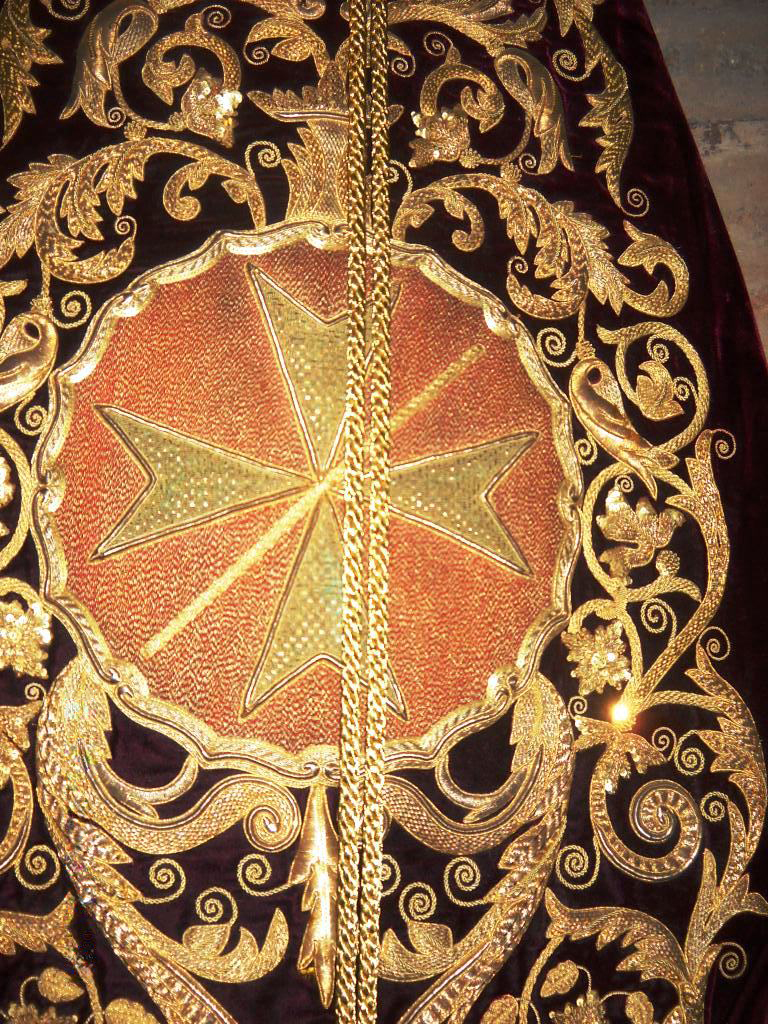 Escudo que aparece en el bacalao de la Hermandad